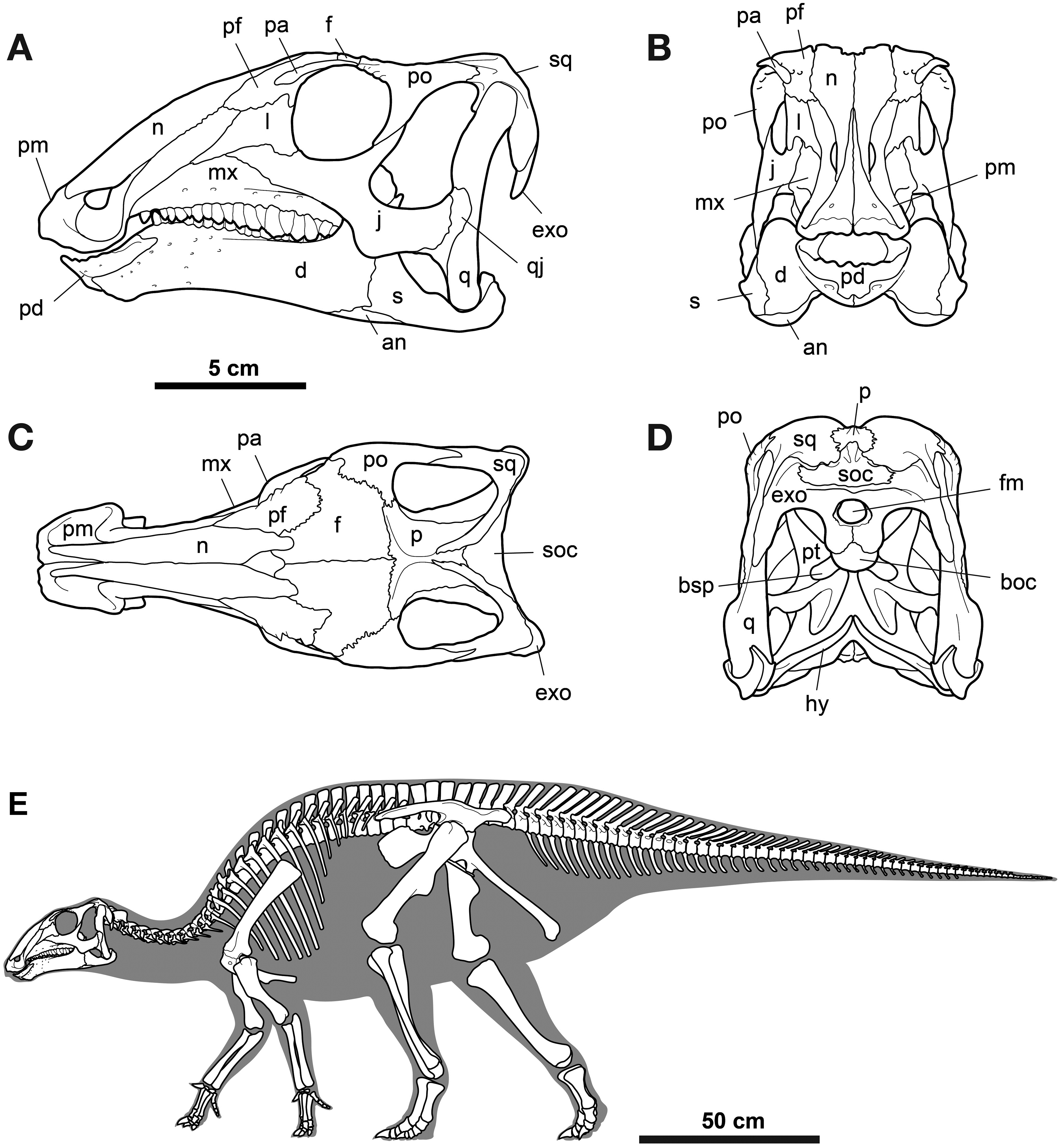 Skeletal reconstructions of Gobihadros mongoliensis. Skull (MPC-D100/763) of Gobihadros mongoliensis in left lateral (A), anterior (B), dorsal (C), and posterior (D) views. Schematic reconstruction of the skeleton of Gobihadros mongoliensis (E) in lateral view. Abbreviations: an, angular; boc, basioccipital; bsp, basisphenoid; d, dentary; exo, exoccipital; f, frontal; fm, foramen magnum; hy, hyoid; j, jugal; l, lacrimal; mx, maxilla; n, nasal; p, parietal; pa, palpebral; pd, predentary; pf, prefrontal; pm, premaxilla; po, postorbital; pt, pterygoid; q, quadrate; qj, quadratojugal; s, surangular; soc, supraoccipital; sq, squamosal.